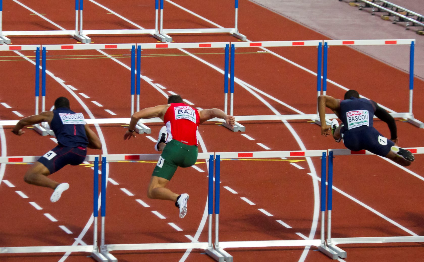 605 finale 110mH mannen